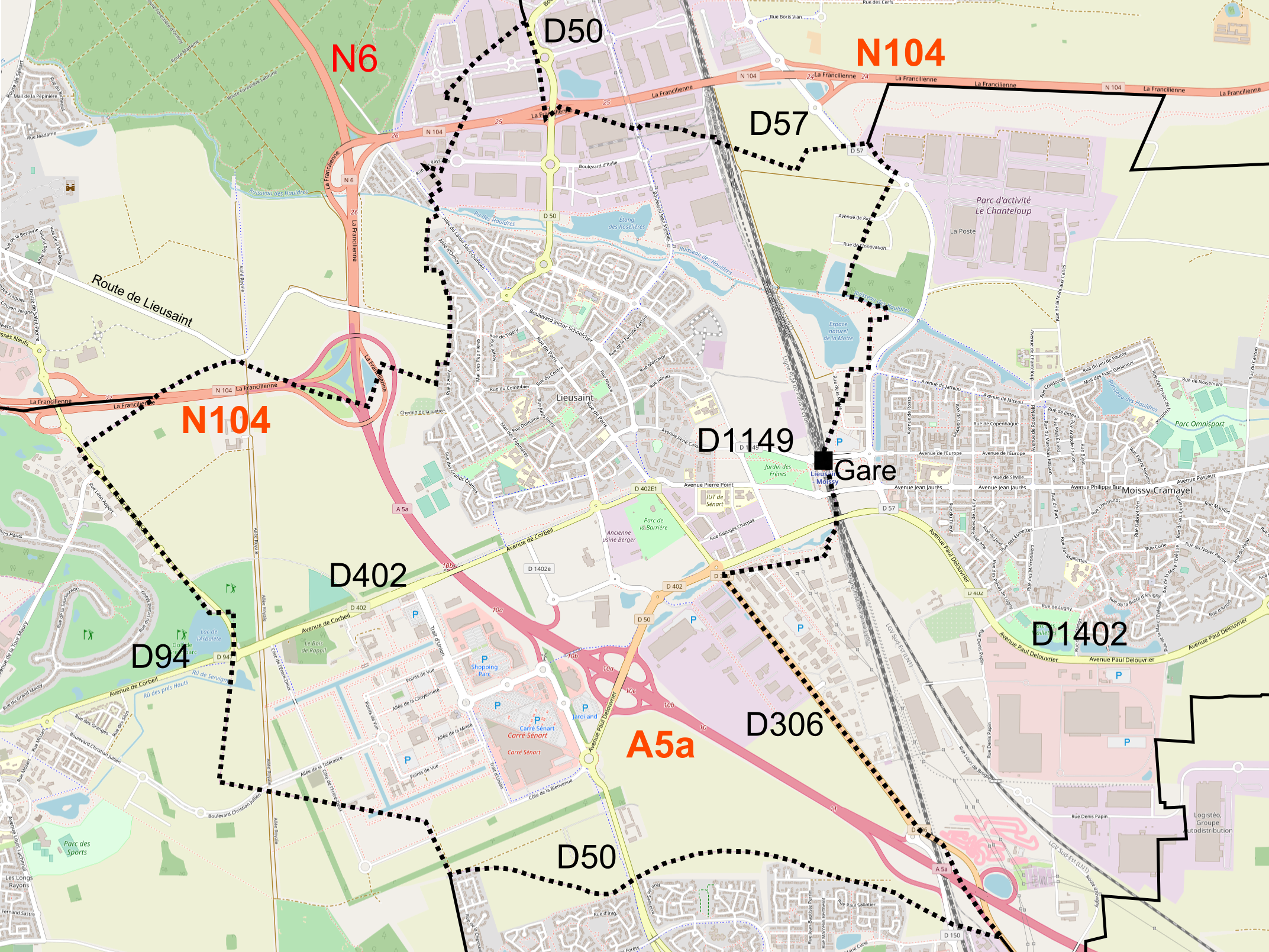 Carte du réseau routier et ferroviaie de la commune de Lieusaint (Seine-et-Marne) (France)